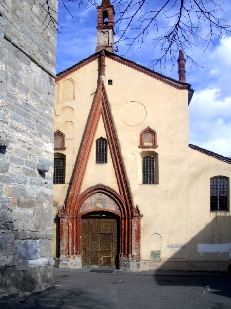 immagine da me creata